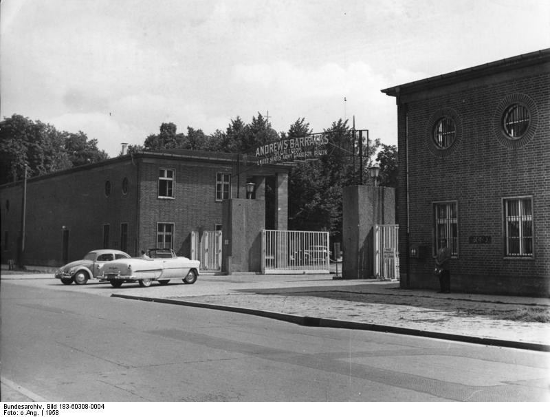 Berlin-Lichterfelde, Andrew Barracks Zentralbild 26.11.1958 Sowjetunion fordert: Berlin den Berlinern. Die ständige Verletzung des Potsdamer Abkommens in allen entscheidenden Punkten durch die Westmächte hat auch dem Viermächte-Status über Berlin die Rechtsgrundlage entzogen. Diese Feststellung traf der Vorsitzende des Ministerrats der UDSSR N.S. Chruschtschow, am 10.11.58 in Moskau. Chruschtschow führte wörtlich aus: Offensichtlich ist die Zeit gekommen, das die Mächte, die das Potsdamer Abkommen unterzeichneten, auf die Reste des Besatzungregimes in Berlin verzichten und damit die Möglichkeit geben, eine normale Lage in der Hauptstadt der DDR zu schaffen. U.B.z.: In der Finkenstein-Allee in Lichterfelde liegt die Kaserne der amerikanischen Besatzungstruppe, die sich als Spezialtruppe bezeichnt. [Berlin-Lichterfelde, Gebäude der ehemaligen Preußischen Hauptkadettenanstalt]